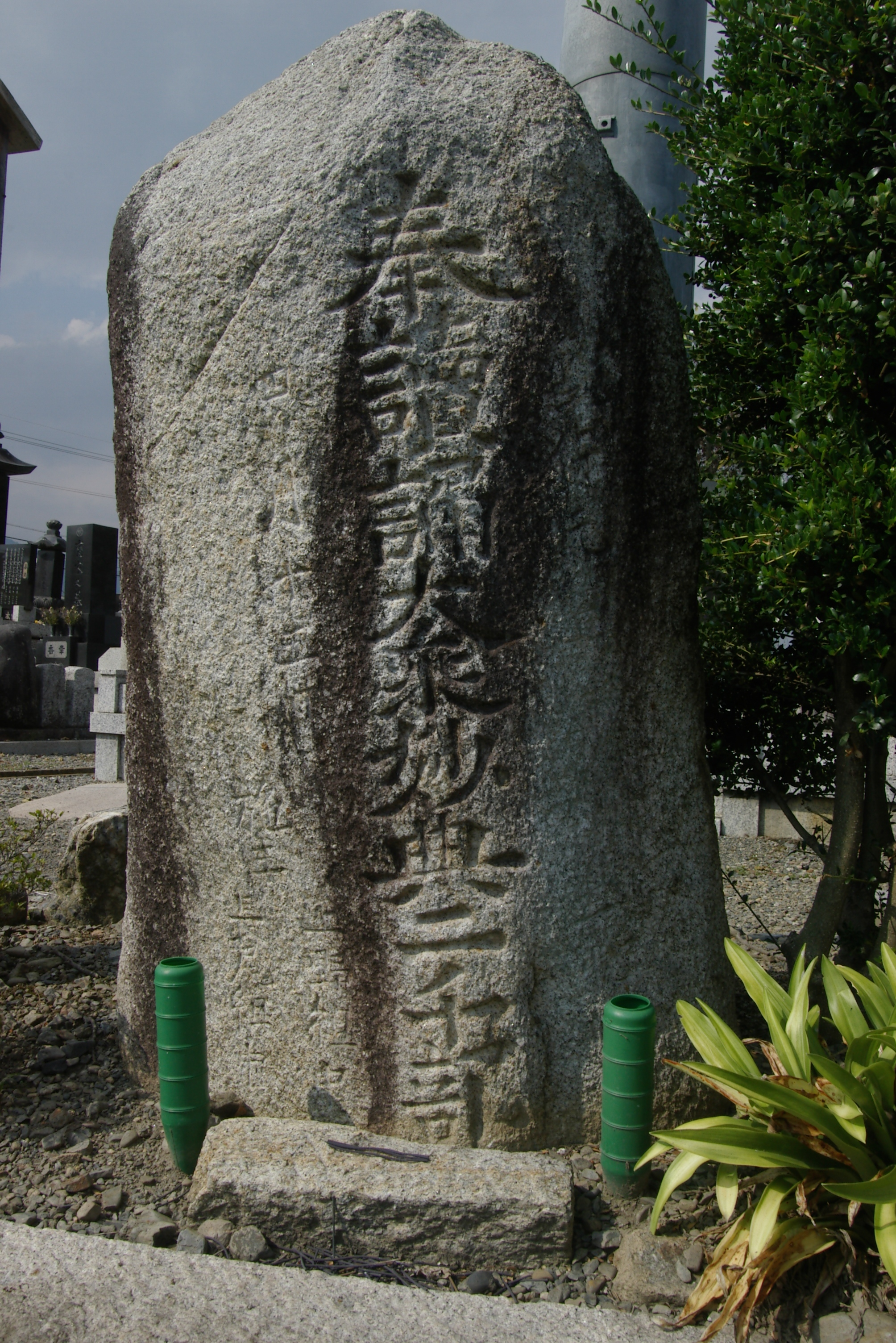 1686年貞享騒動があり、生きる権利を命をかけて守った義民加助ほか28人の顕彰供養塔を50年忌に1741年に建立。（経典2千部を奉読誦し終え上野組（16）長尾組（21）合わせ37か村の村人がなし得たことはこの時代では稀少で偉大な出来事だった。）建立の地は義民主格の多田加助の右腕だった小穴善兵衛がかつて治めていた楡の地である。 銘文 「奉読誦大乗妙典ニ千部」 寛保元辛酉年 願主 悦叟 4月15日 施主 上野組中 長尾組中